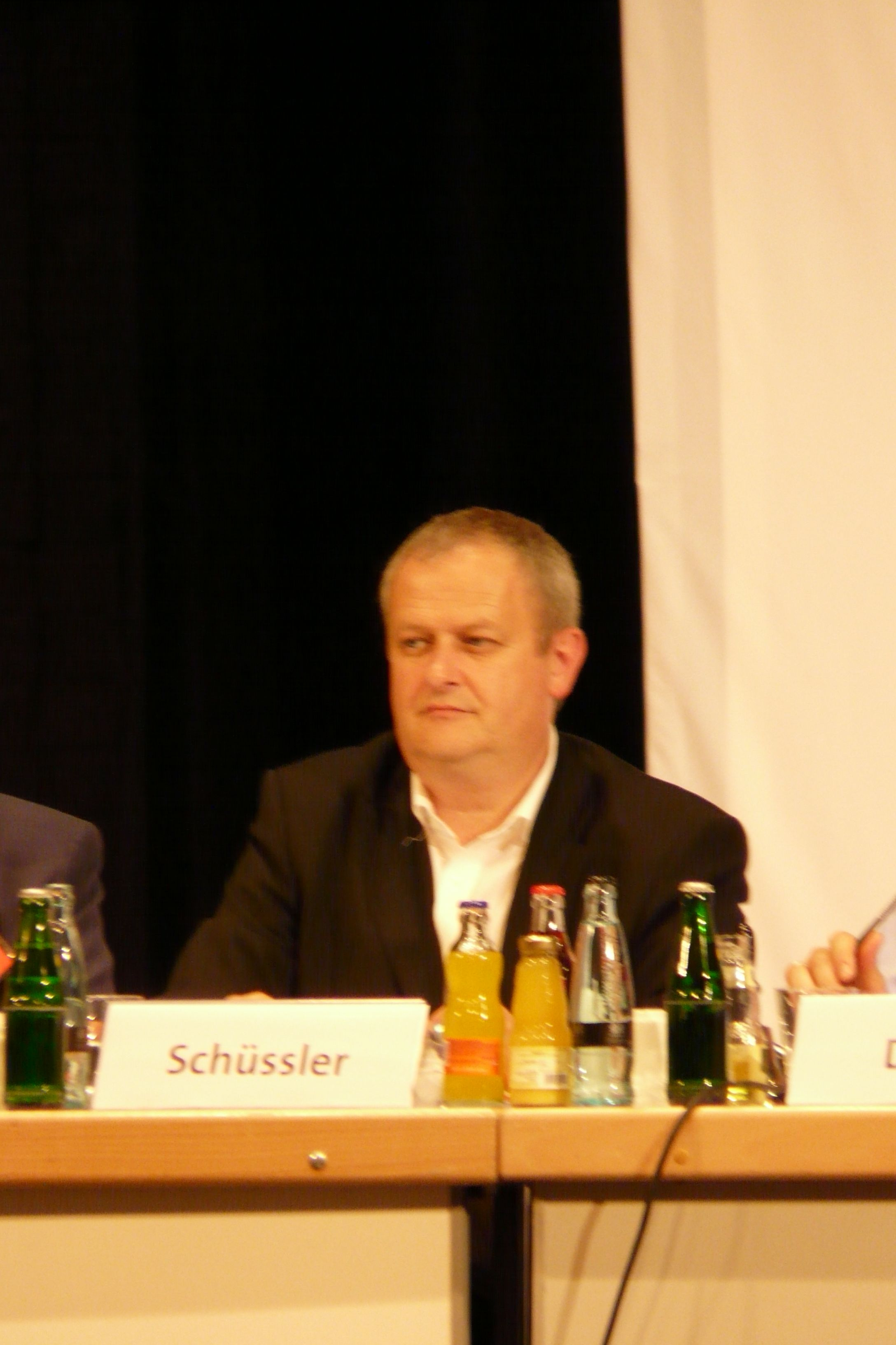 Jurgen Schüssler MdHB SPD Hamburg